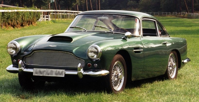 Aston Martin DB4 (Serie 2) 1960